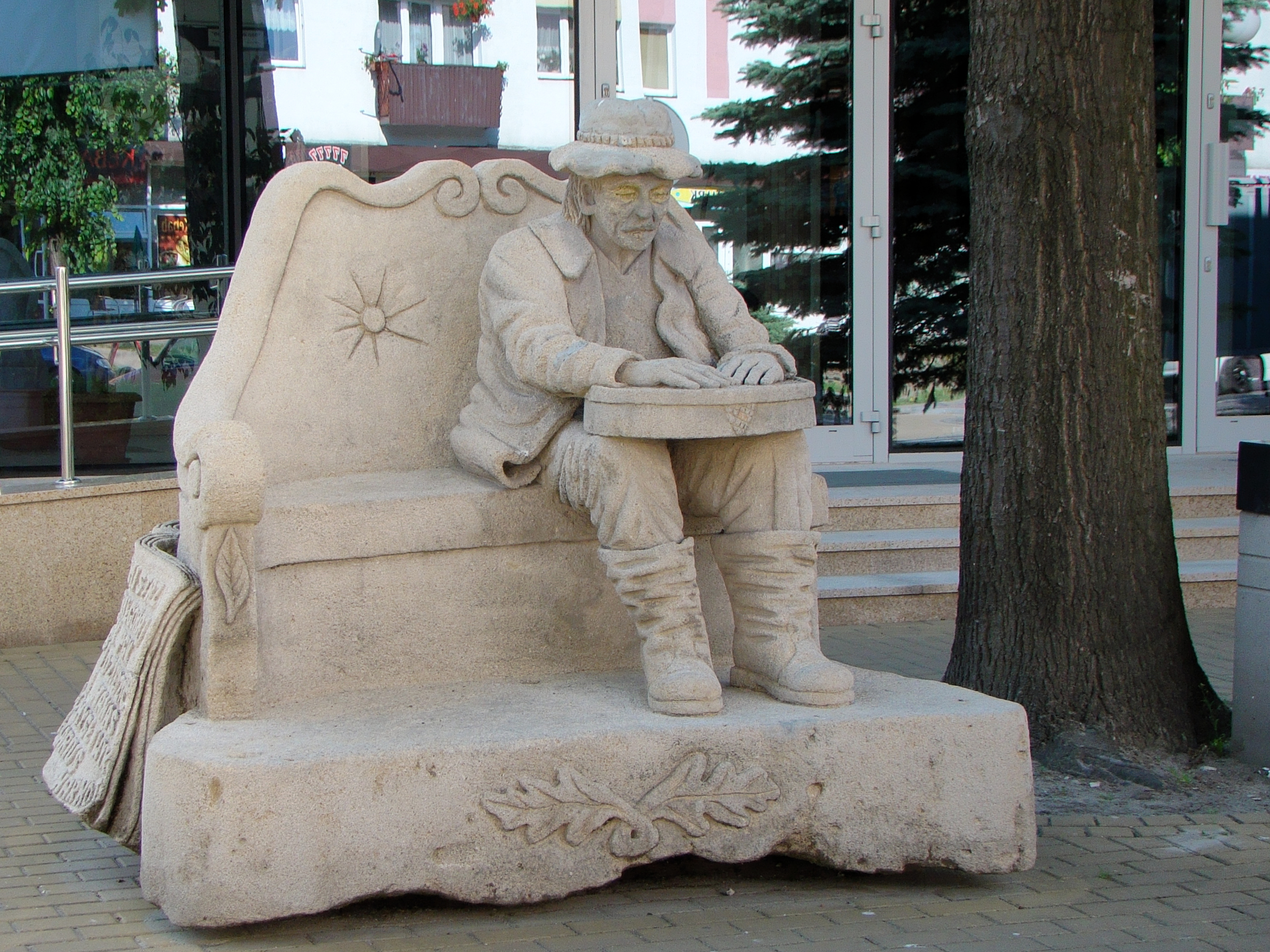 Biłgoraj - pomnik sitarza przed Biłgorajskim Centrum Kultury